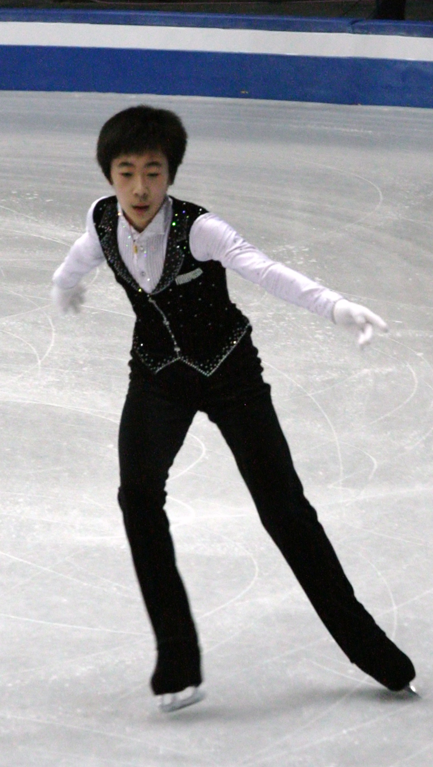 Jin Boyang (Китай) на финале Гран-при среди юниоров 2012-2013. Произвольная программа.